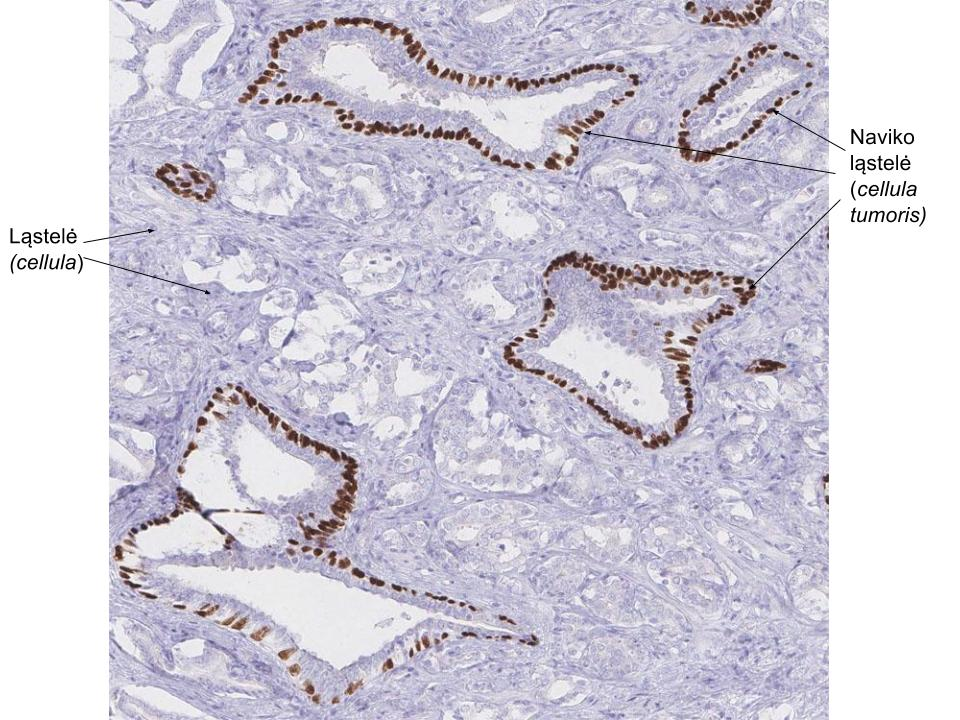 Prostatos vėžys